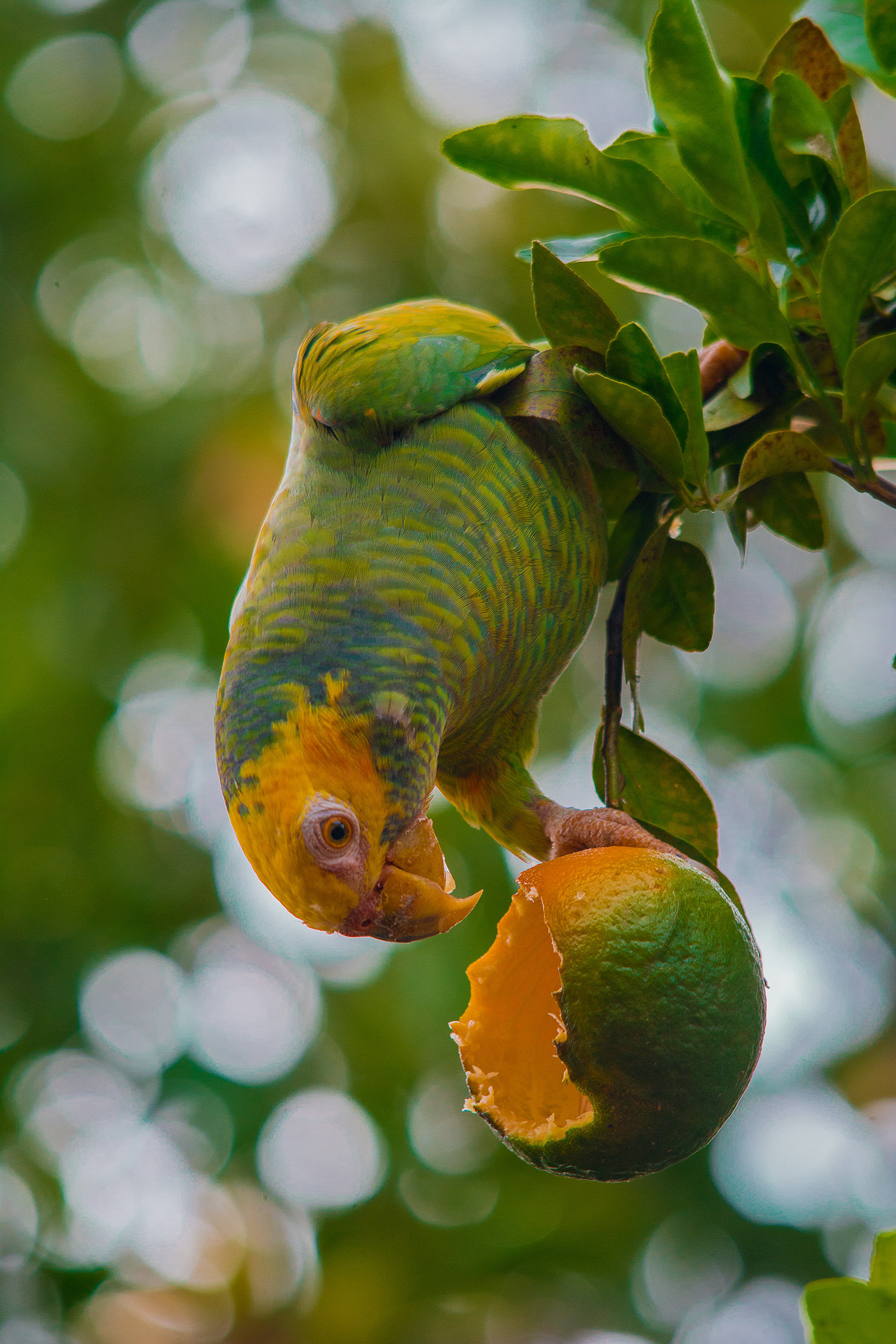 Registro realizado na cidade de Três Lagoas-MS, zona urbana. Um bando pousou em um pé de poncã para se alimentar.